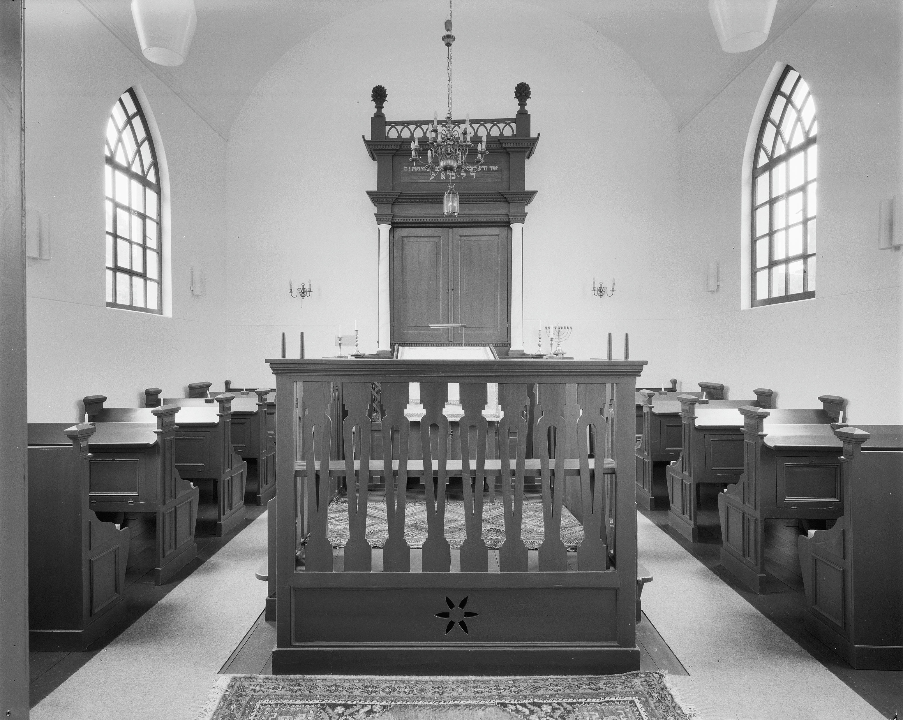 Synagoge: De gebedsruimte met Heilige Arke en biema (= verhoging voor het voorlezen van de Tora) van de synagoge te Haaksbergen